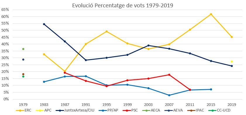 Evolució percentatge de vot